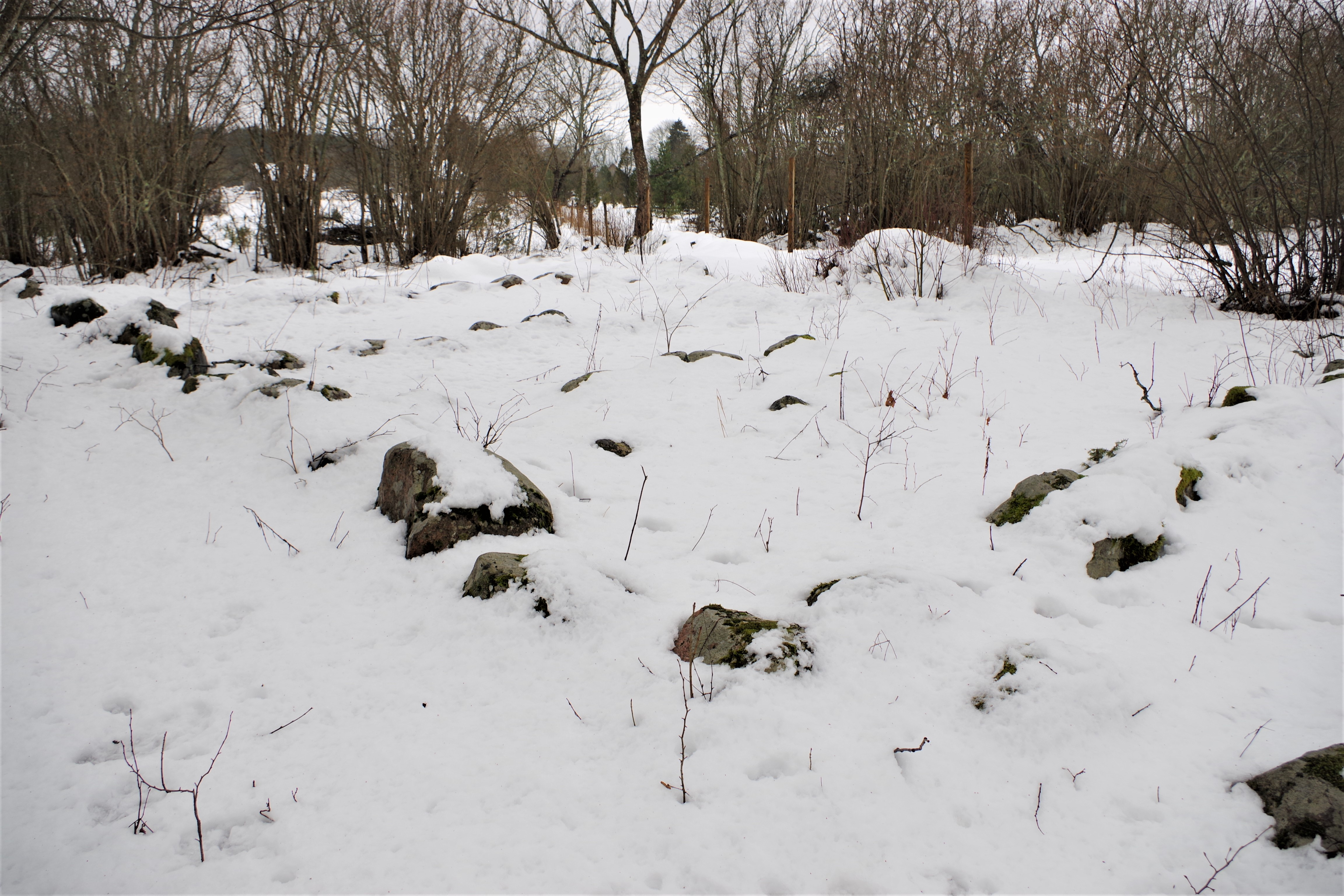 Poanse tarandkalmed (ka Poanse kalmistu) on kaks muitset tarandkalmet Pärnu maakonnas Lääneranna vallas Poanse külas.Kalmed on pärit I aastatuhande II poolest eKr.